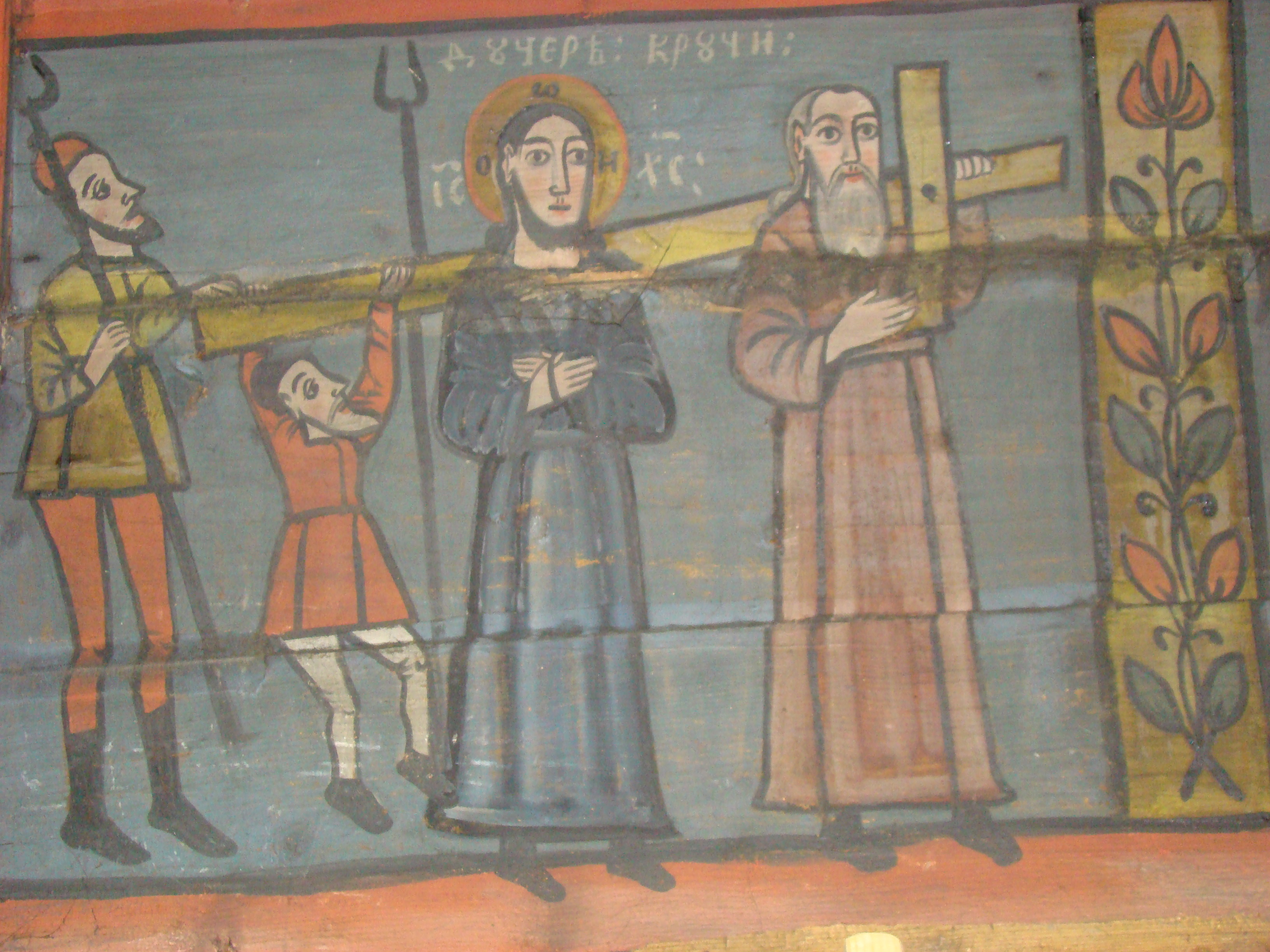 Biserica de lemn „Sf.Dumitru” din Păușa, județul Bihor